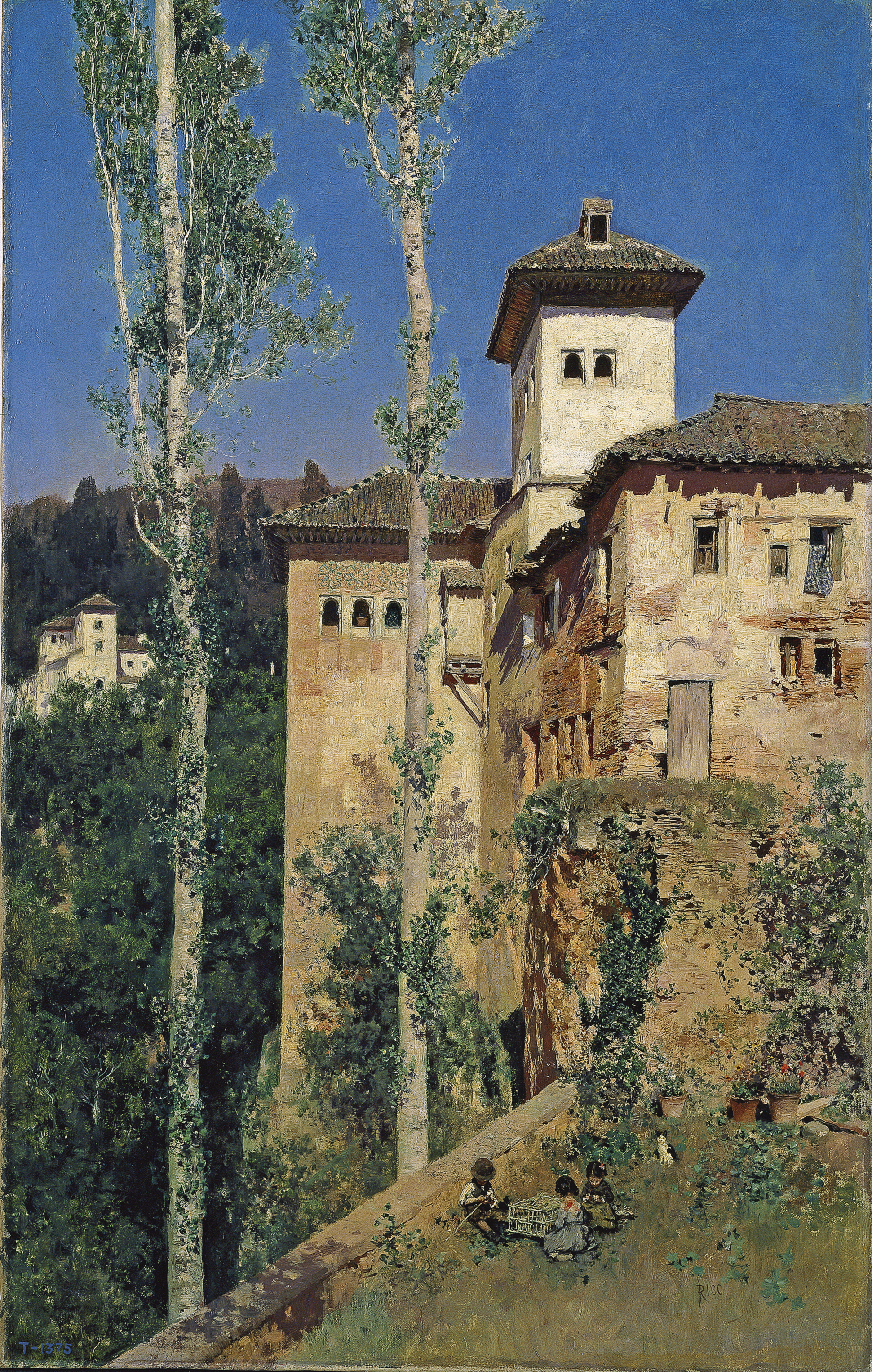 "La Torre de las Damas en la Alhambra de Granada",1871. Óleo sobre lienzo, 62,5 x 39 cm. Actualmente en el Museo del Prado.